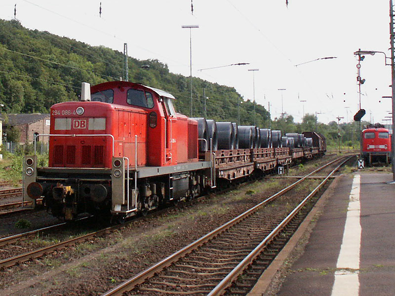 294 086 ist mit vorher aus Bochum angelieferten Stahlcoils unterwegs vom Güterbahnhof Dillenburg zum Stahlwerk der ThyssenKrupp Nirosta